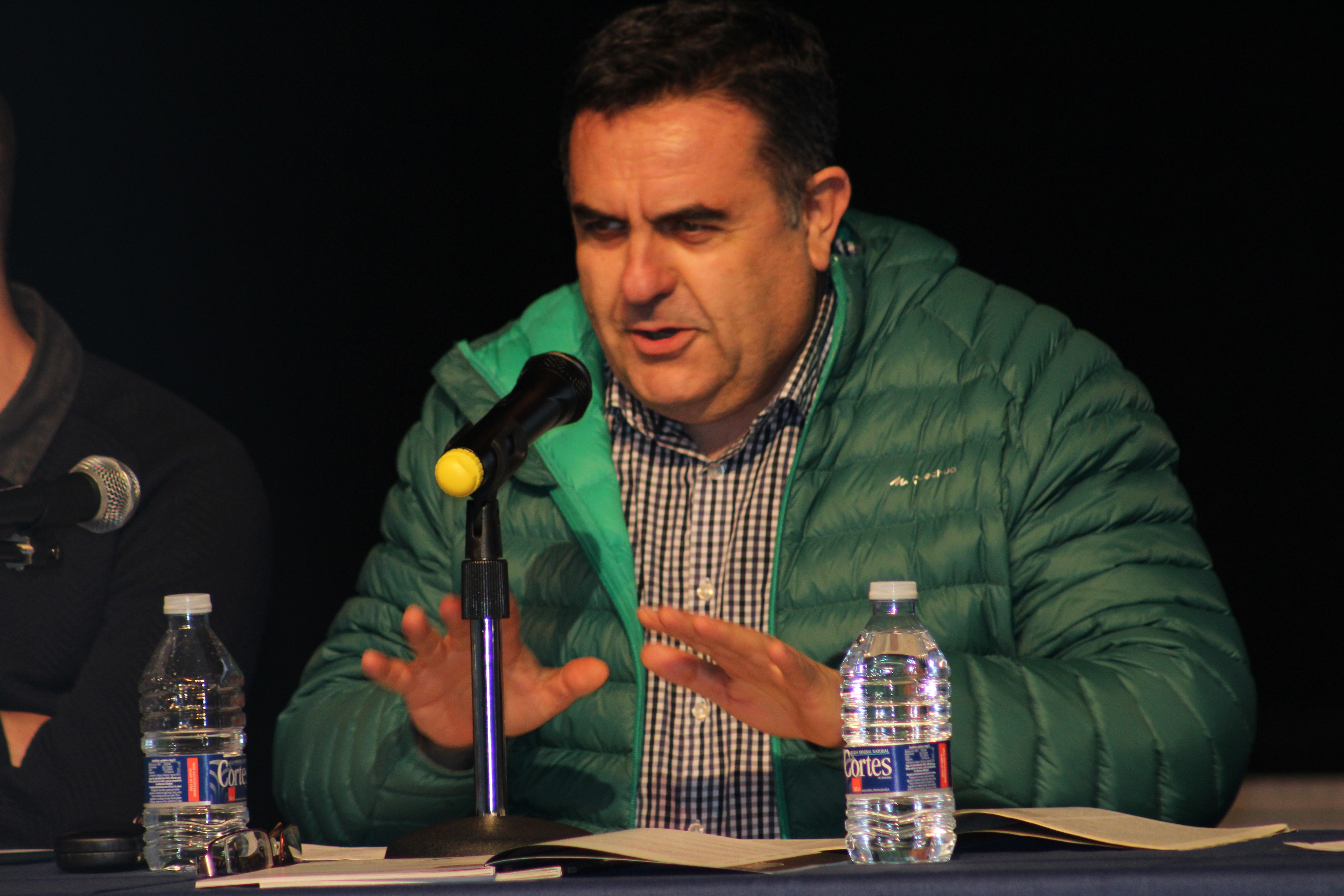 Presentació del número 423 de Saó i del digital PilotaVeu. Vicent Boscà, de Saó. Fotografia realitzada amb la càmera digital de PilotaVeu